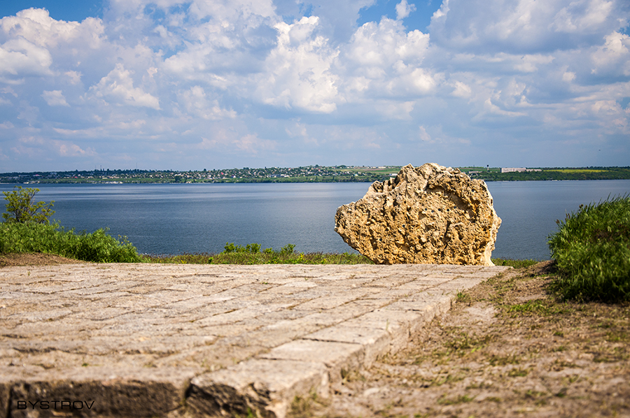 Каменская Сечь